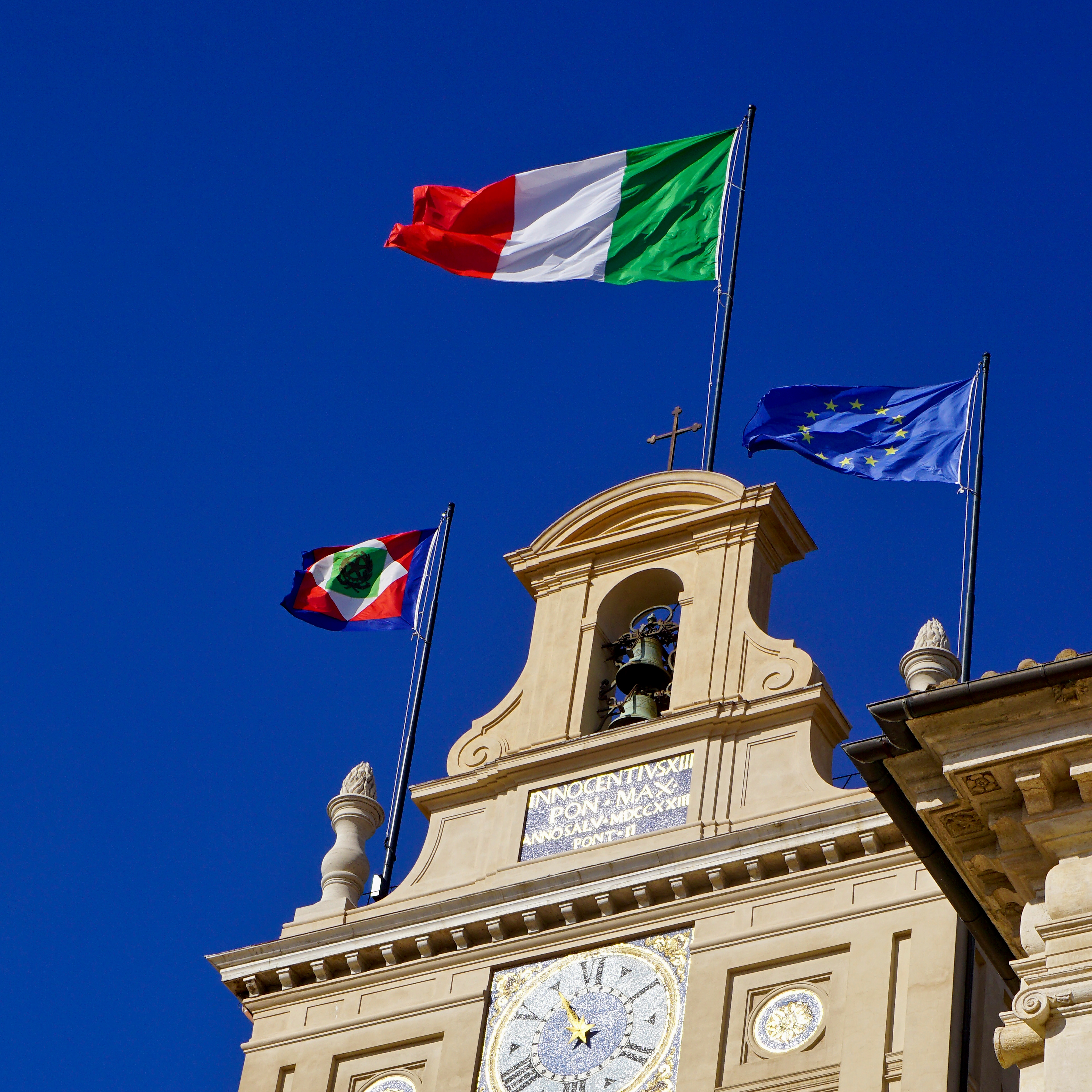 Viva l'Italia